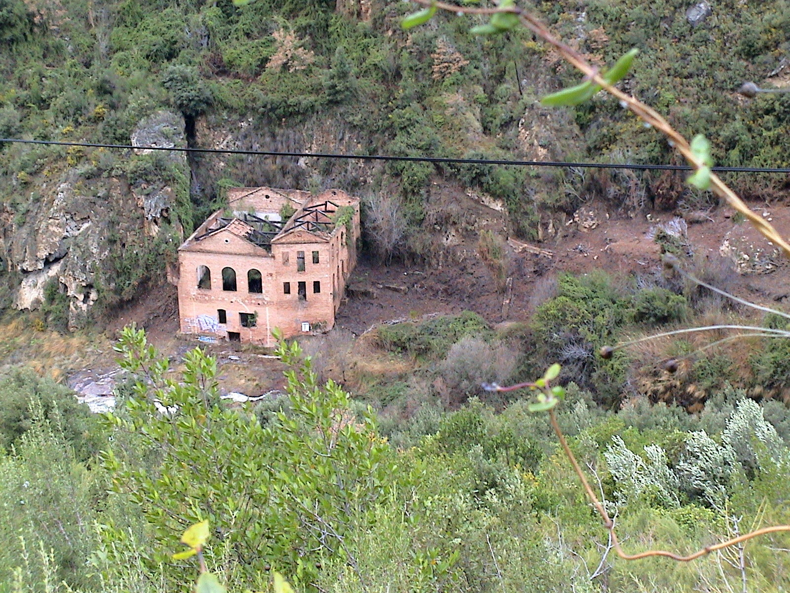 La Central del Fai (Riells del Fai, Bigues i Riells, Vallès Oriental)